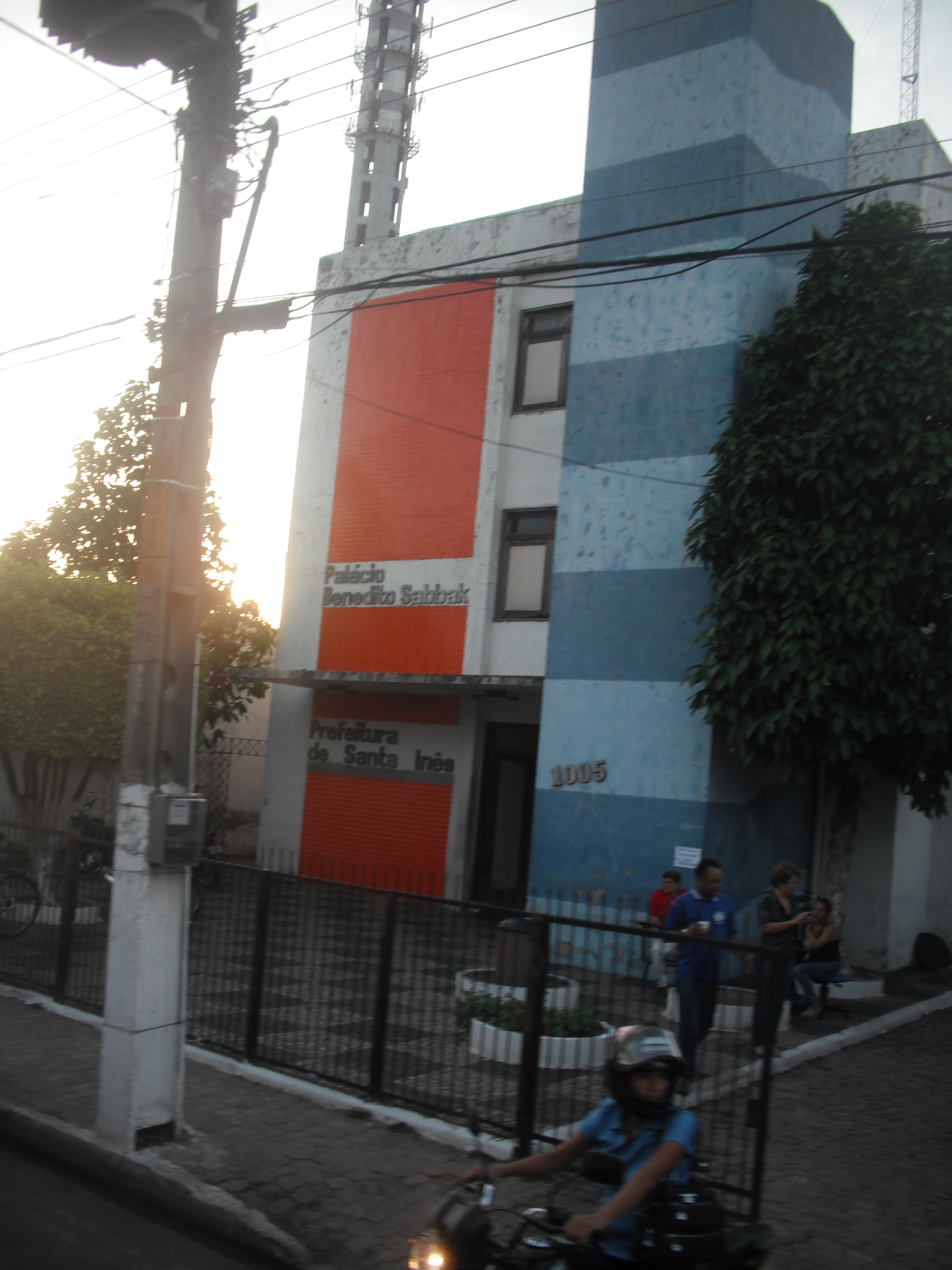 Prefeitura Municipal